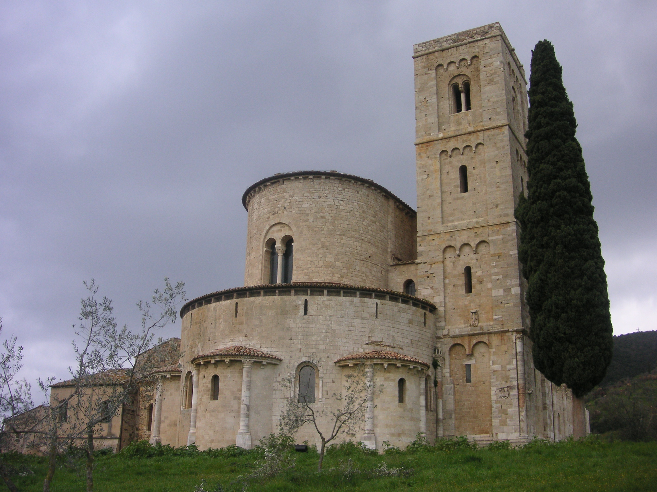 Cupressus sempervirens, Abbazia di Sant'Antimo